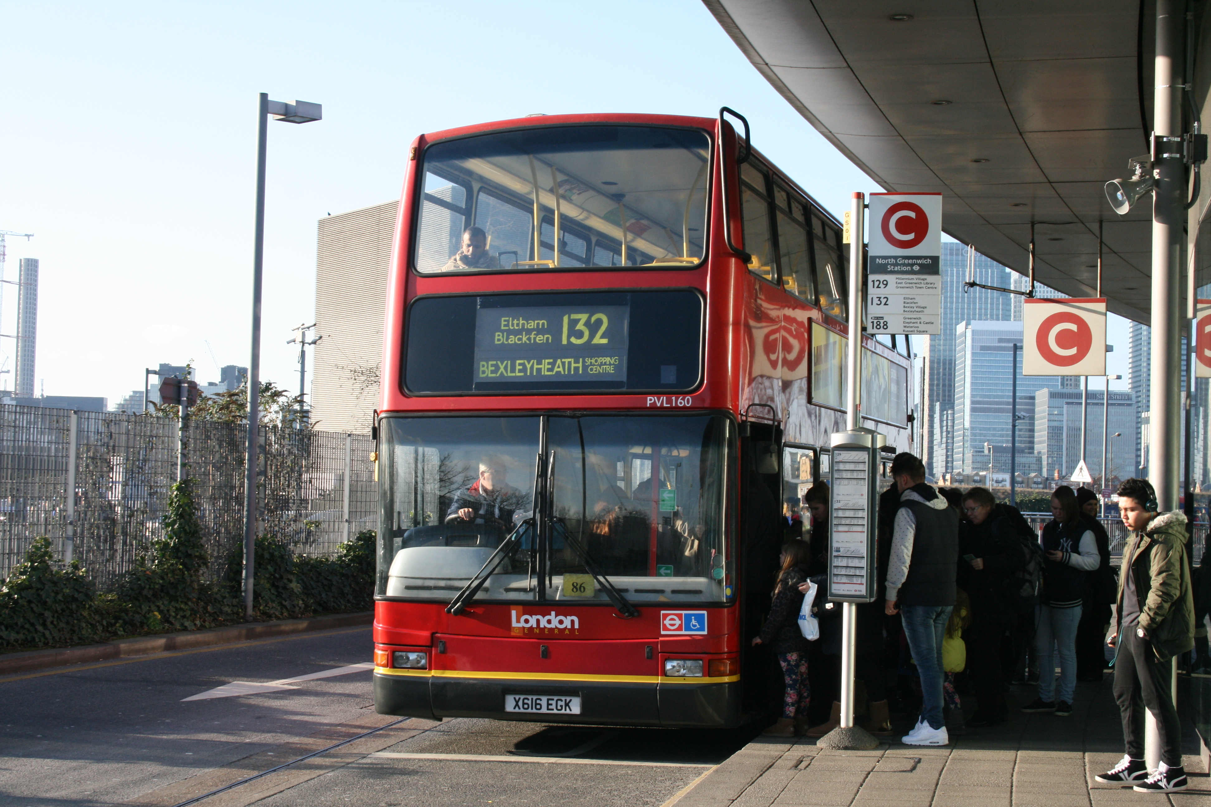 X616 EGK